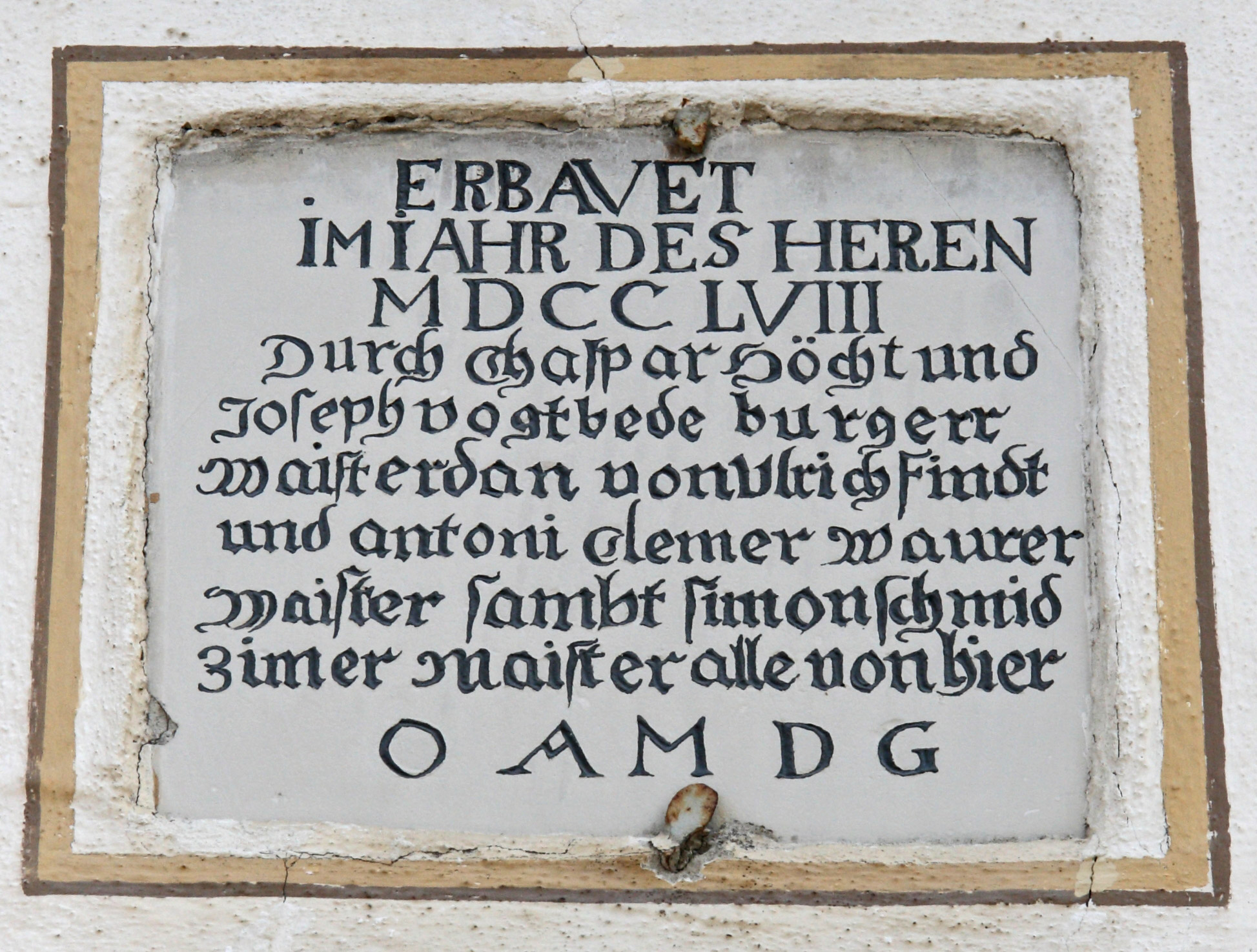 Solnhofer Platte über dem Nordeingang mit Inschrift über die Erbauer